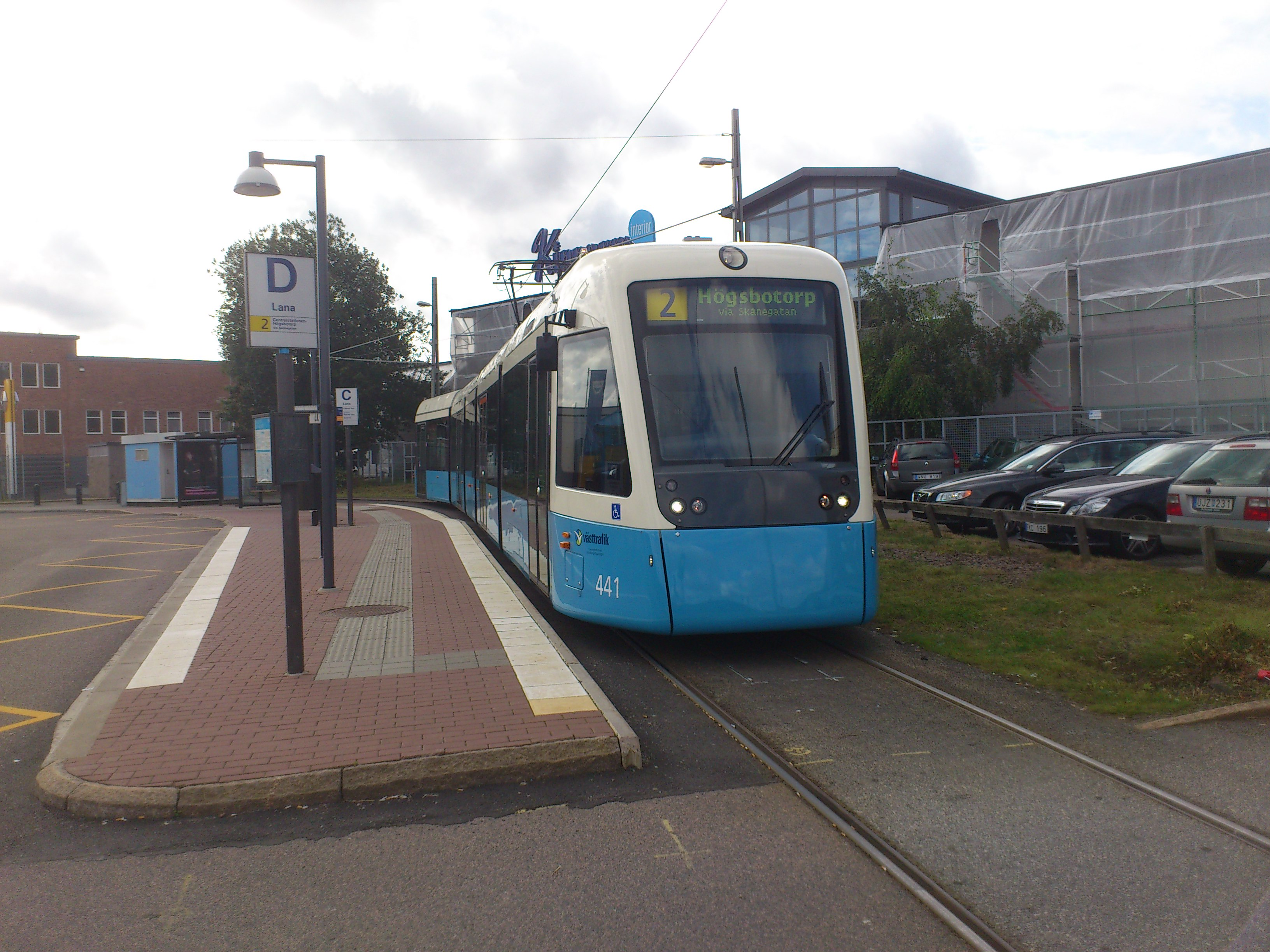 M32 441 lana